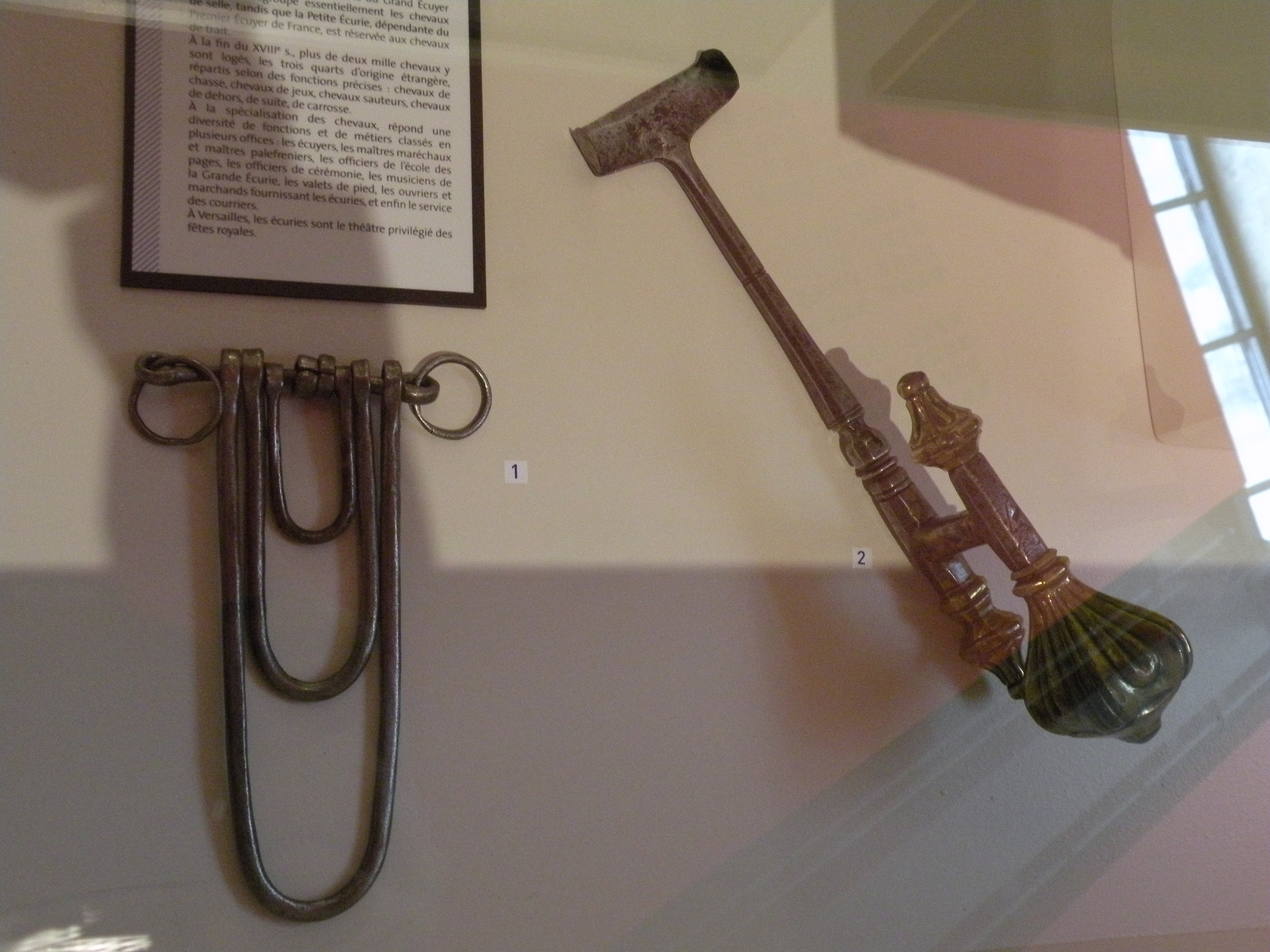 Salles du rempart du musée de Normandie - Équitation mastigadour à 3 pas d'ane et boutoir